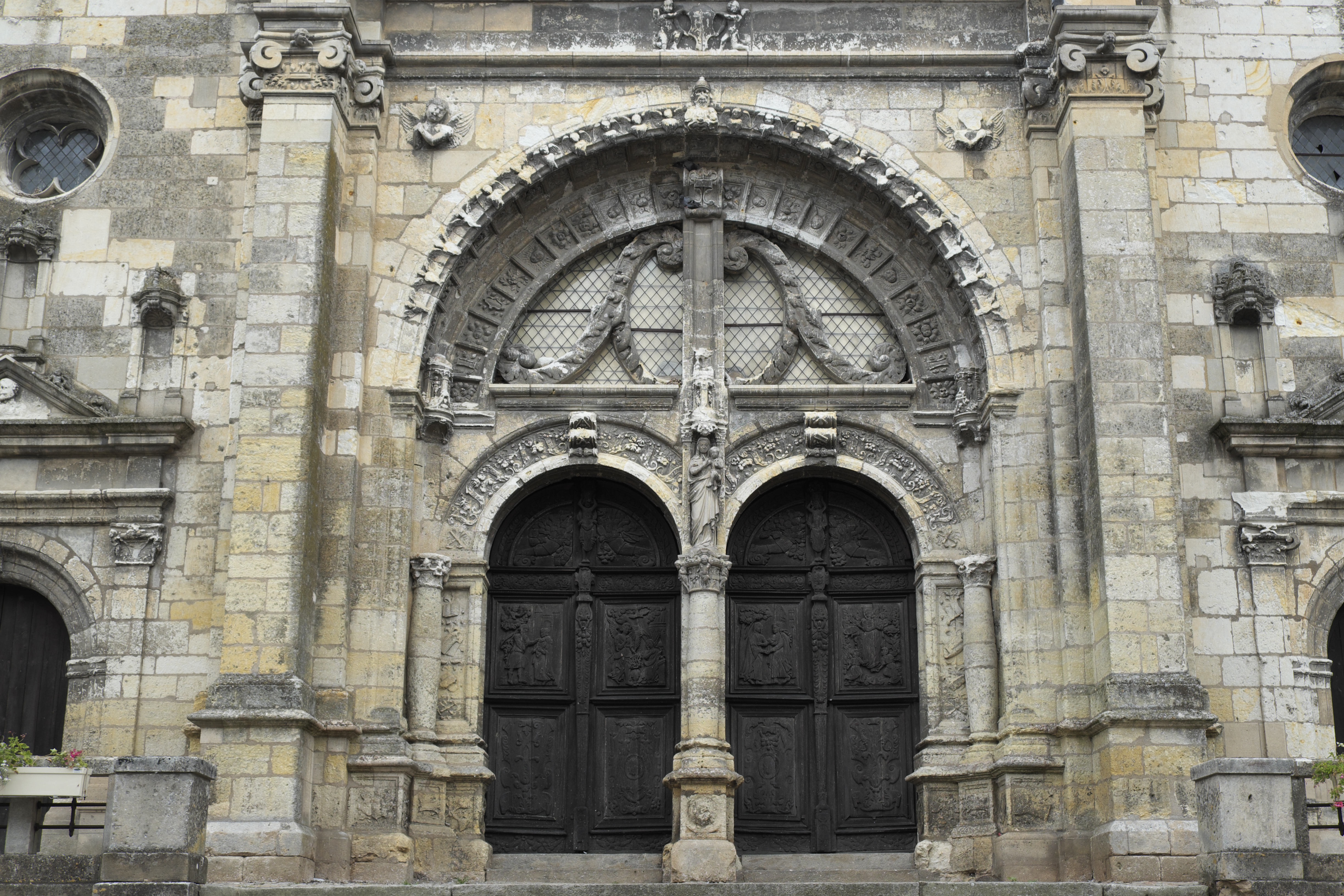 Kirche Notre-Dame in Saint-Calais im Département Sarthe (Pays de la Loire/Frankreich), Westportal, mit geschnitzten Türflügeln aus der Renaissance